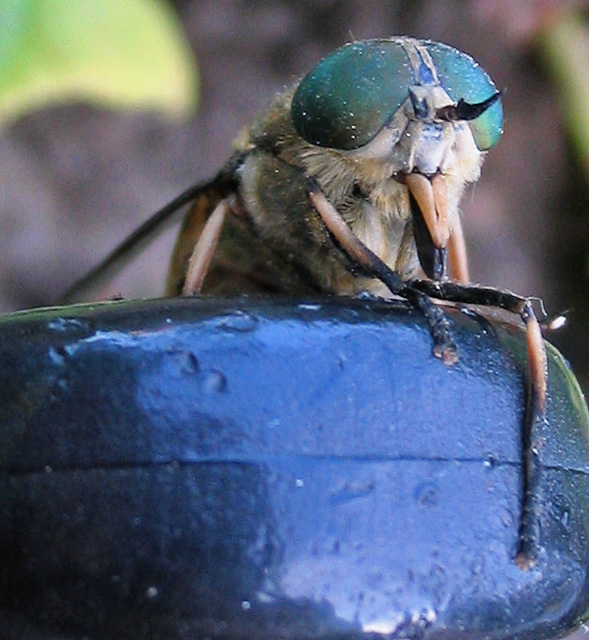 Beschreibung: Gemeine Viehbremse (Tabanus_bromius) Fotograf: Darkone, 2. Juli 2005